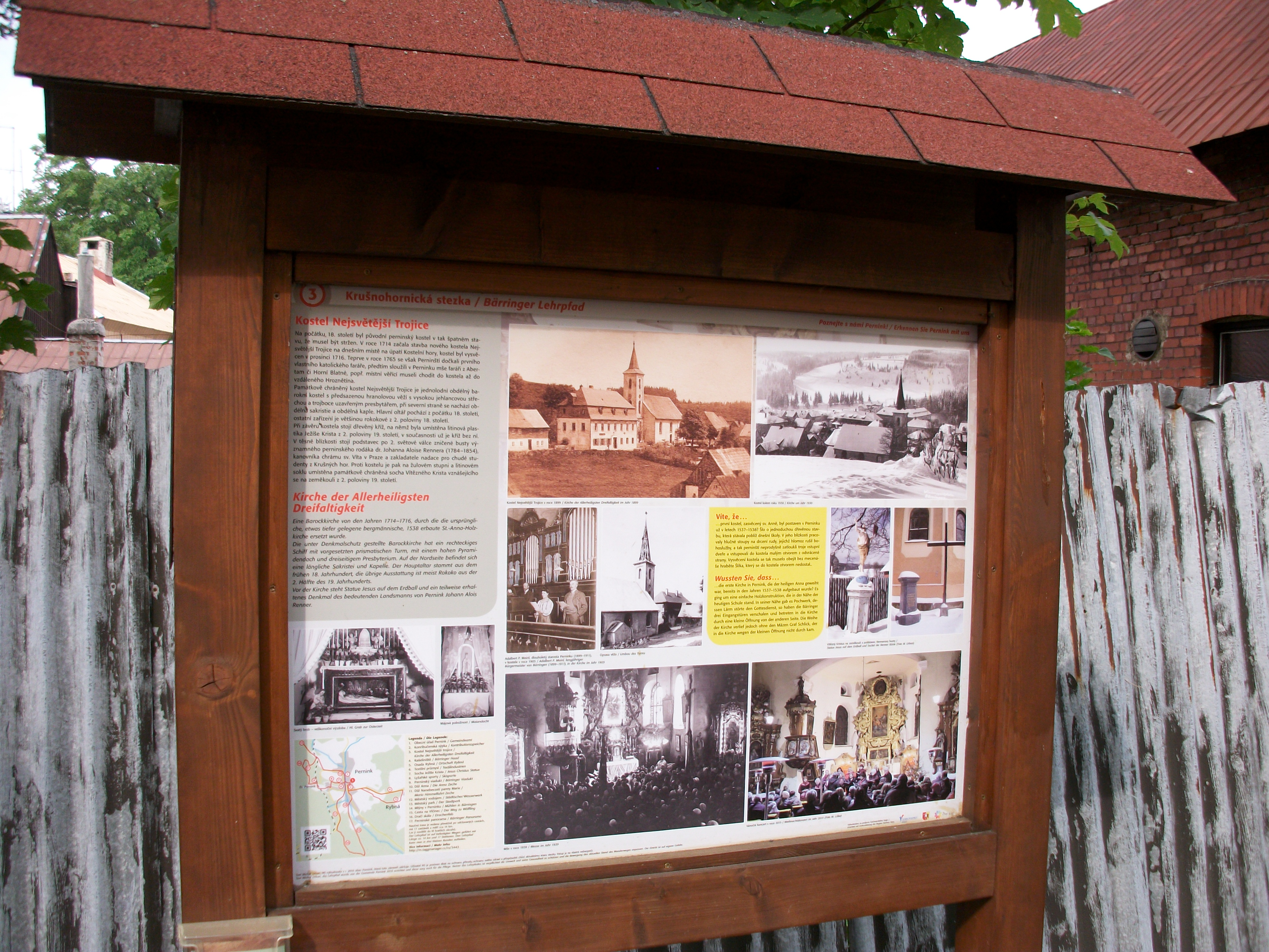 Bärringer Lehrpfad, Tafel 3 Kirche der Allerheiligsten Dreifaltigkeit